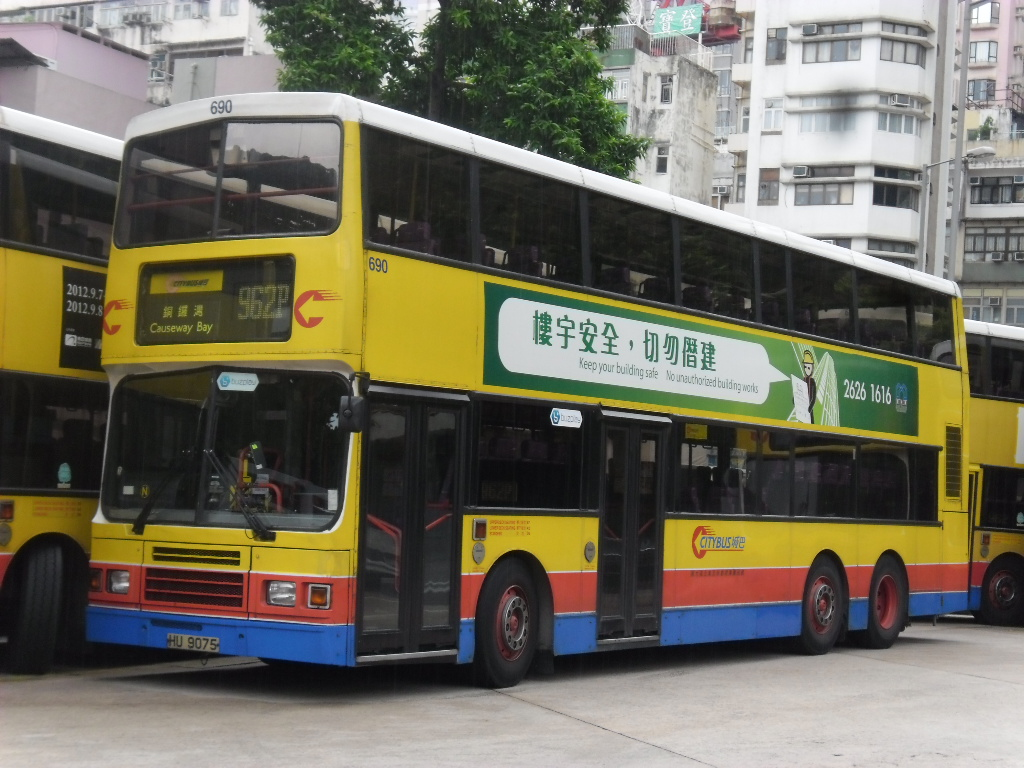 中文（香港）: 城巴962P線，只在平日早上繁忙時間行駛